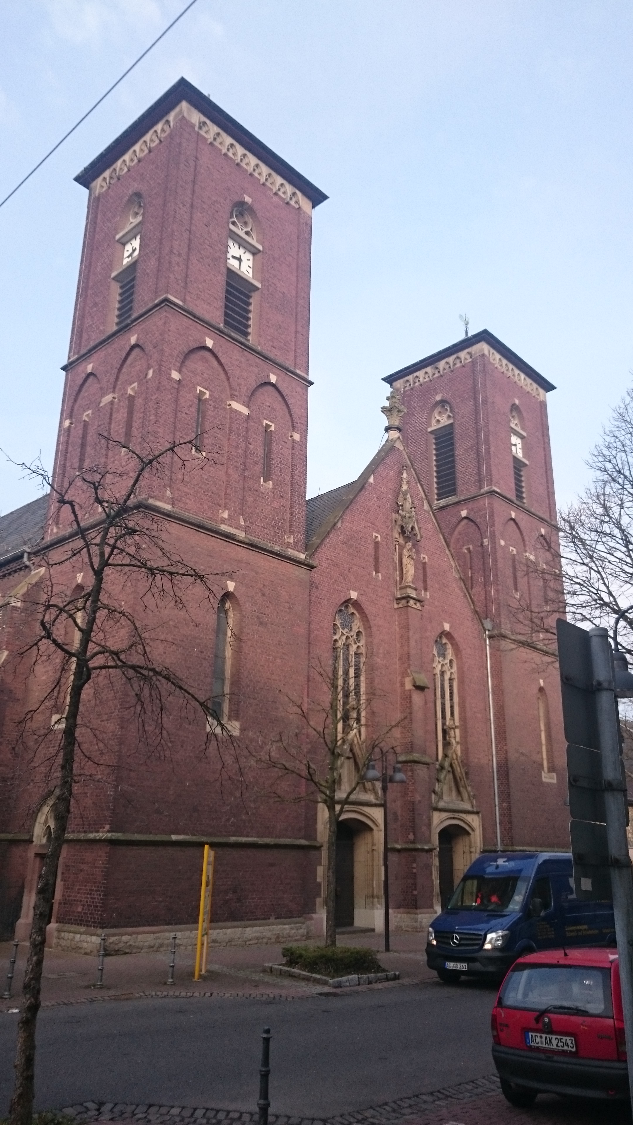 Pfarrkirche St. Mariä Himmelfahrt (Stolberg)